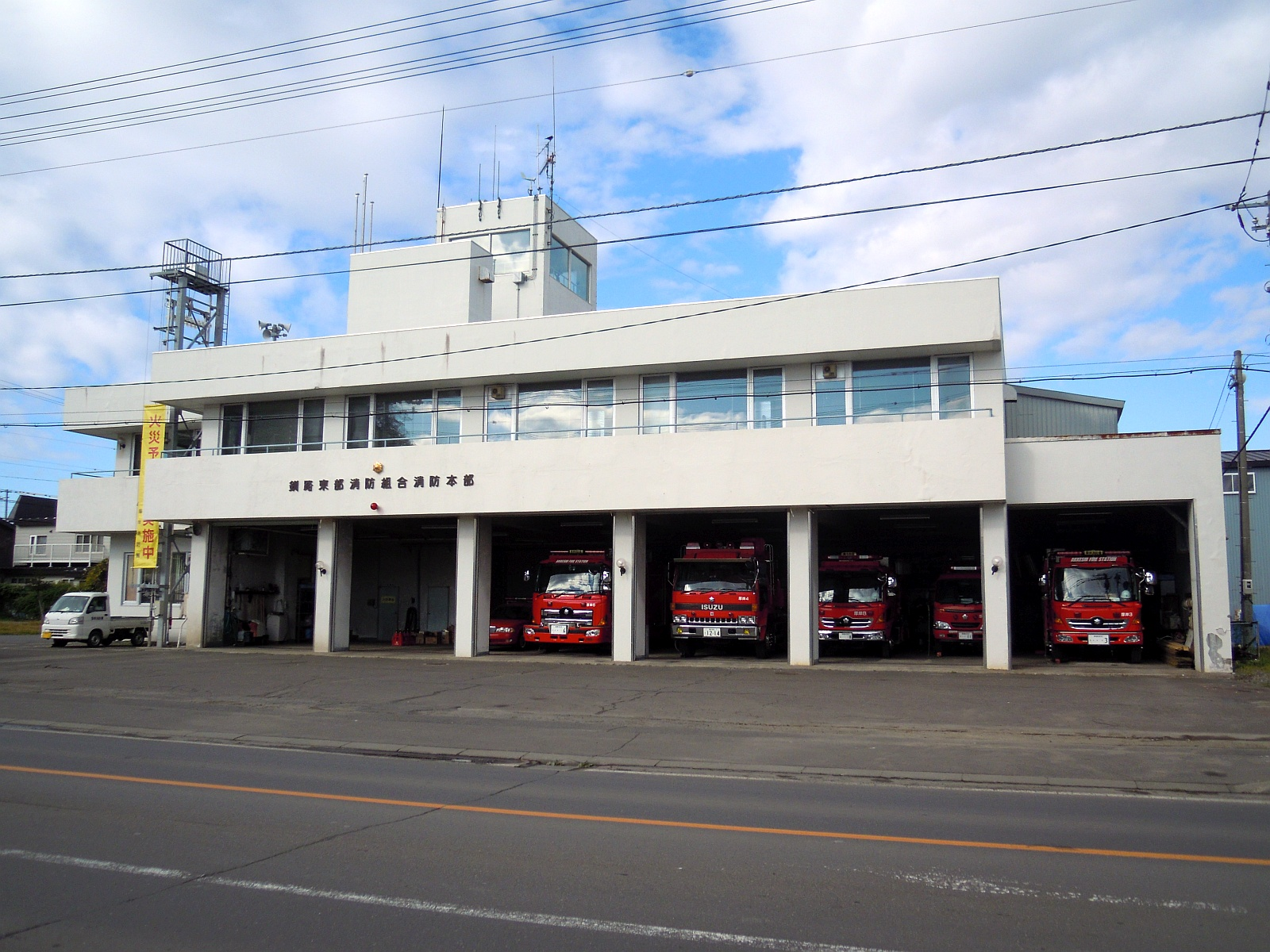 北海道厚岸郡厚岸町にある釧路東部消防組合消防本部庁舎